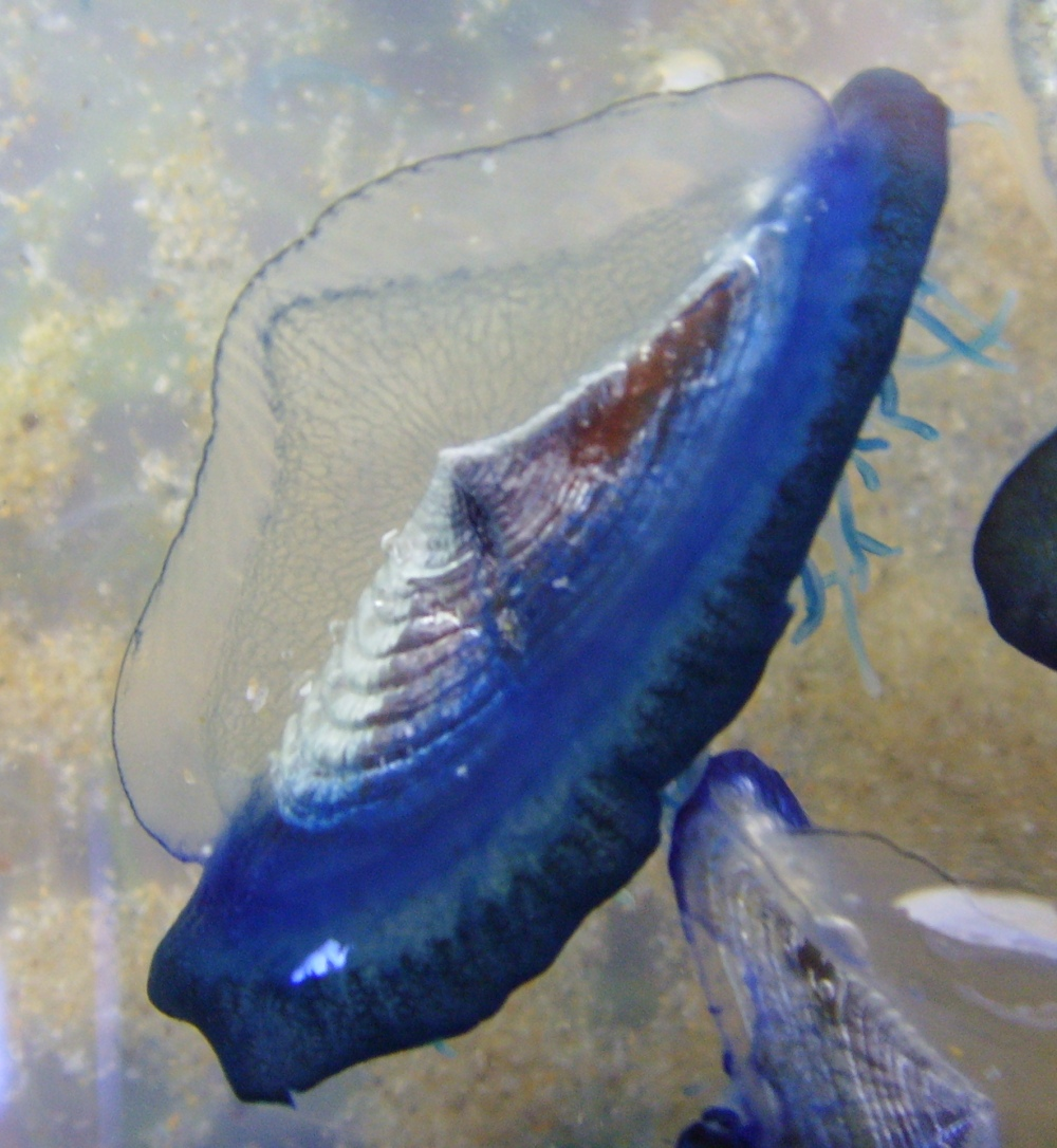 Échouage massif de Velella velella, baie des Trépassés, Roscoff, Finistère, France